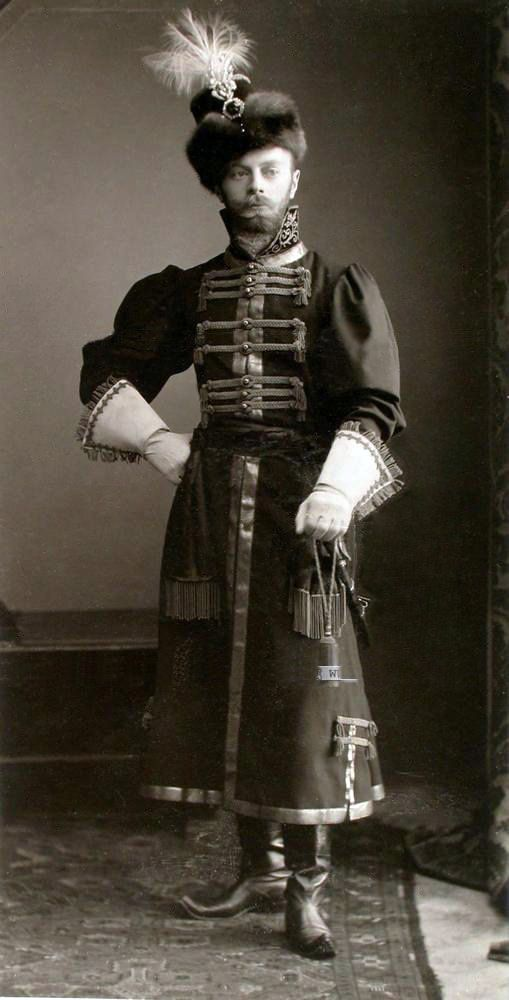 Гвардии штабс-капитан Преображенского полка А.А.фон Дрентельн в наряде начального человека из жильцов времен царя Алексея Михайловича.